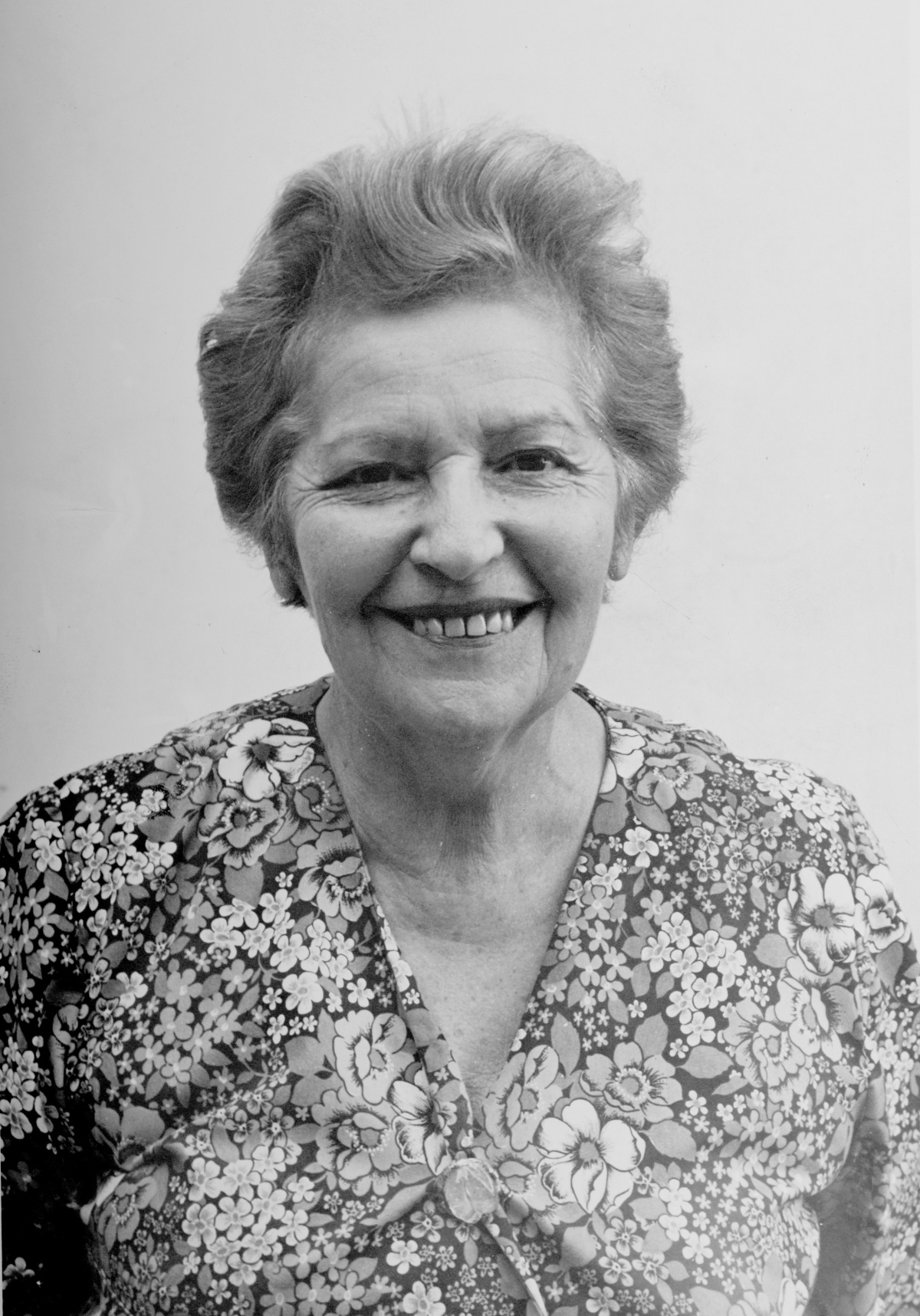 Grete Mostny (1914-1991), directora del Museo Nacional de Historia Natural de Chile entre 1964 y 1982.